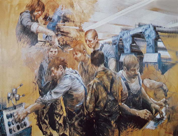 Serie : Druckereibilder, Druckereibilder II, 1978, 130 x 173 cm, Öl auf Leinwand, Bez. u.r. “Timner 78”